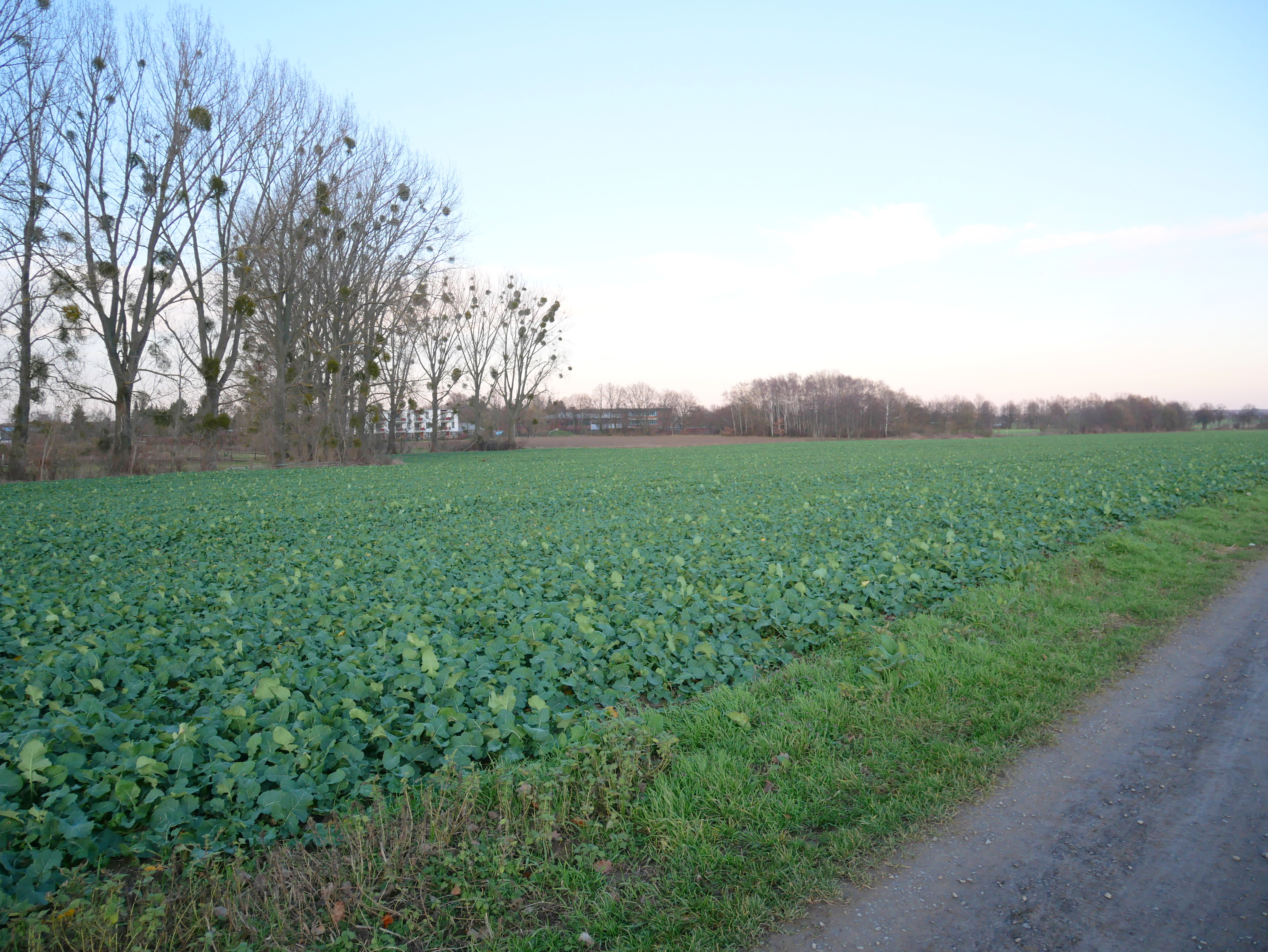 Laut Heinz Webers "Flurnamenlexikon zur Flurnamenkarte Wennigsen" (Hannover 1989) handelt es sich hierbei um die abgegangene Wüstung Husen, deren Nordteil wohl an dem Weg begann der heute Heinz-Berndt-Weg bzw. - in Verlängerung - "Am Häuserhof" heißt. Das Feld auf dem die um 1400 verlassene Siedlung stand läuft entlang des Waldkaterbachs und hieß entsprechend auch Hüserfelde/Huserbruch. Es scheint der Ursprungsort der Familie v. Hauß (Eimbeckhausen) zu sein.